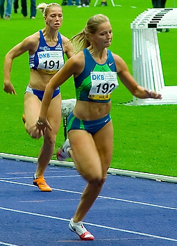 100m B-Lauf ISTAF 2006: Susann Dombrowski, Sina Schielke